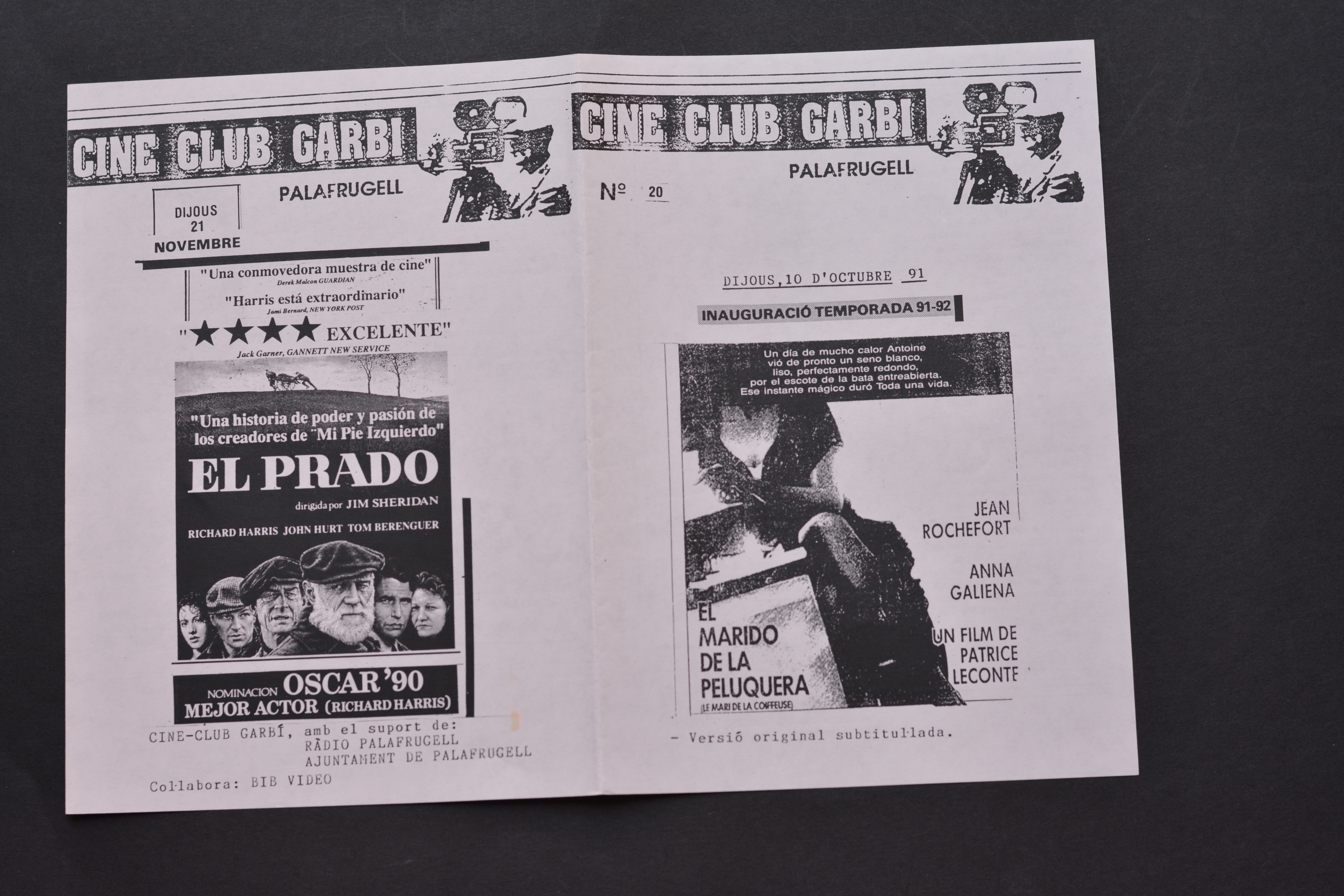 Fulletó d'una sessió de cinema de la 1ª etapa del Cine Club Garbí (fons Cine Club Garbí - Arxiu Municipal de Palafrugell)